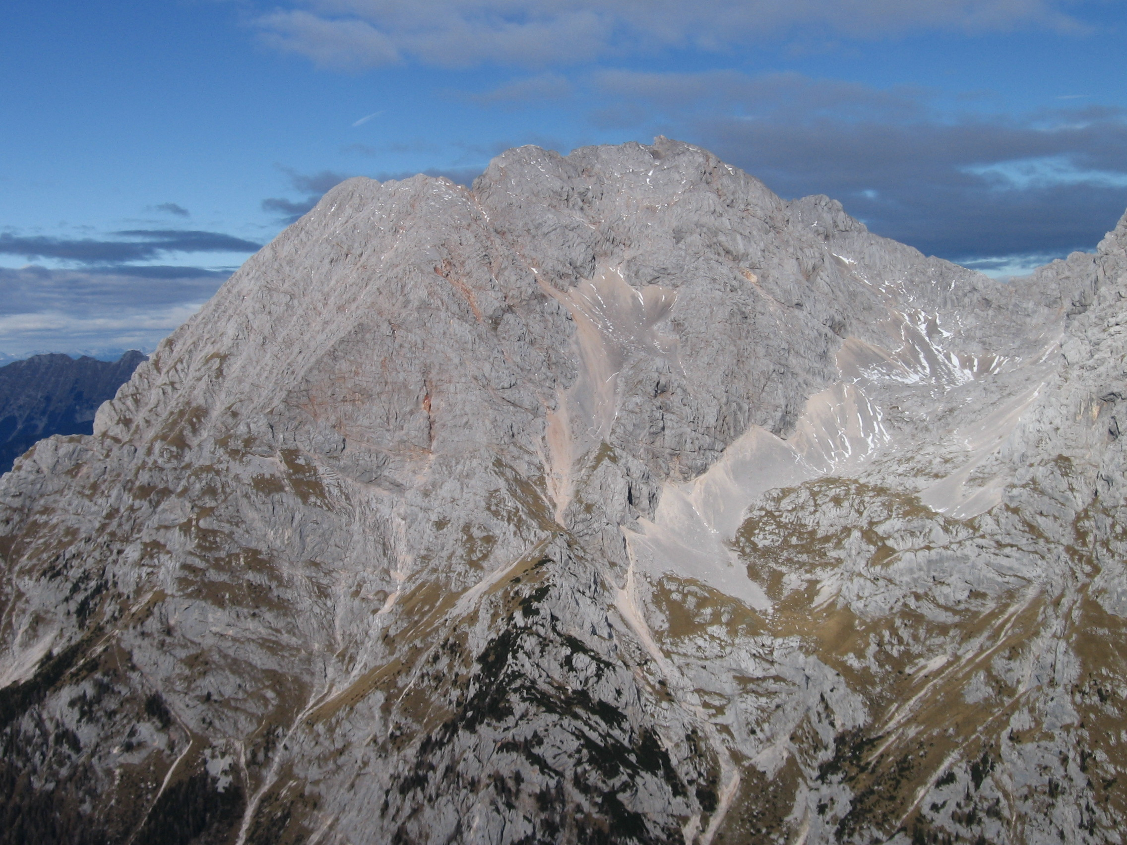 Mount Kočna in Kamnik Alps, from Kalški greben (south)